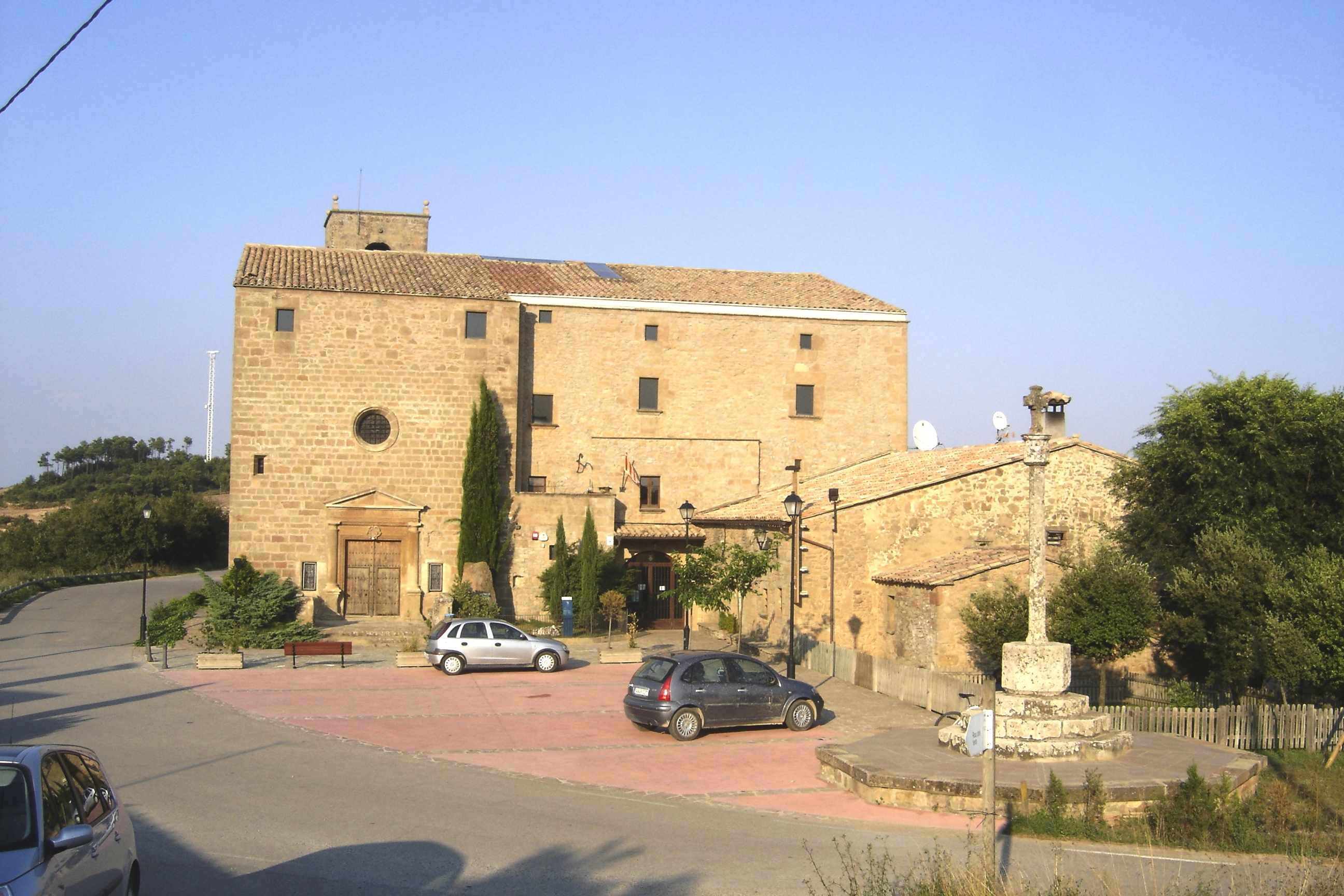 Pinos (Solsonès) - Al centre de la imatge, el Santuari i l'edifici de l'ajuntament